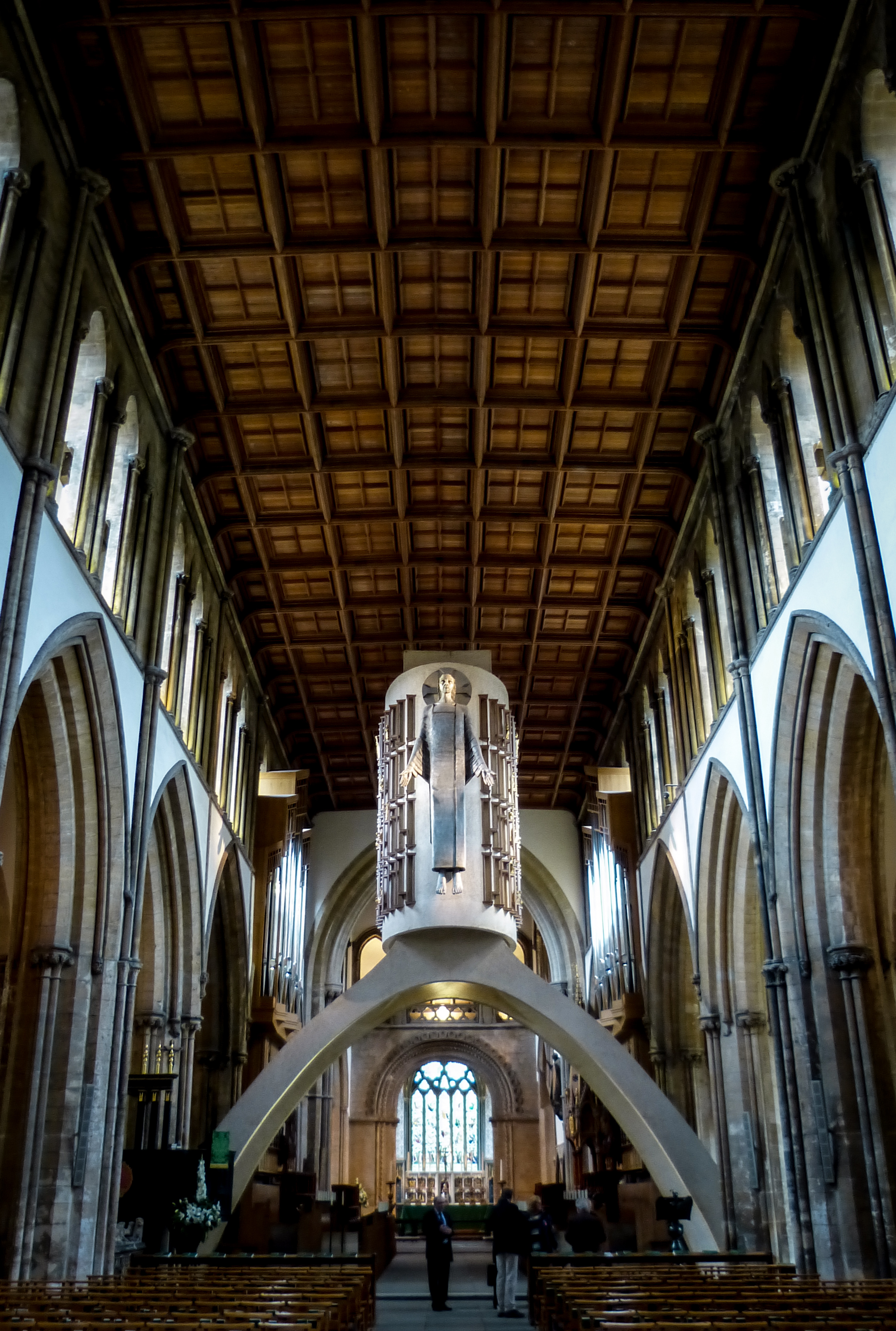 Llandaff Cathedral